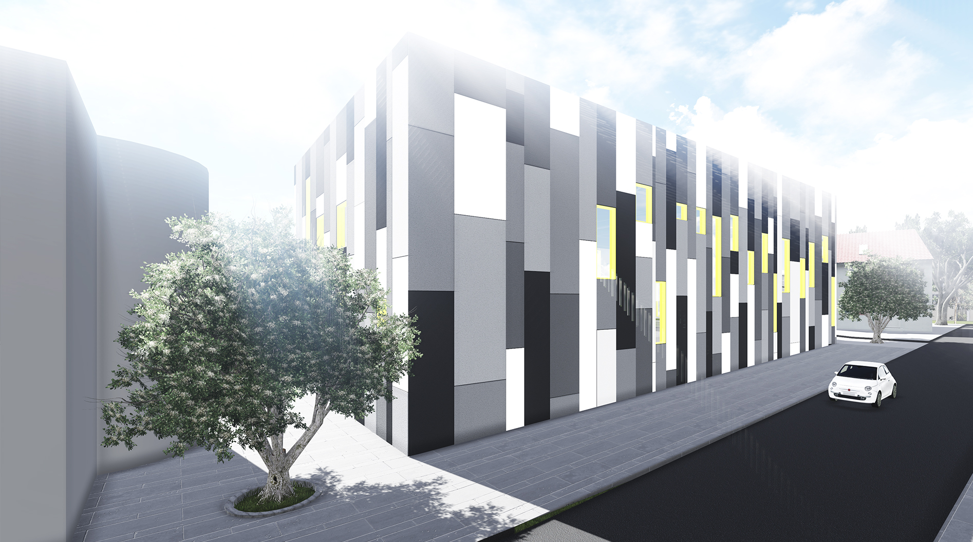 אולם ספורט בתל אביב (בבנייה) תכנון: מוטי בודק ודנה אוברזון